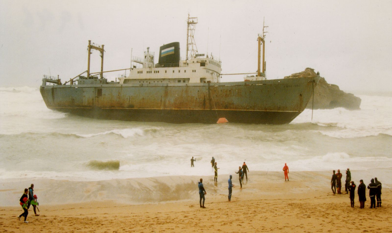 Strandung der "Franz Halz" vor Biarritz am 26.11.1996